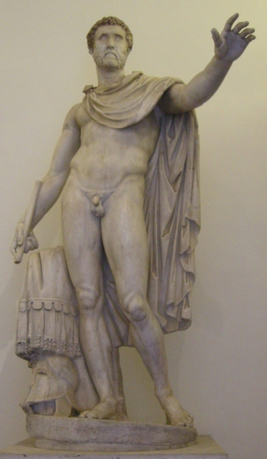 Statua di antonino pio